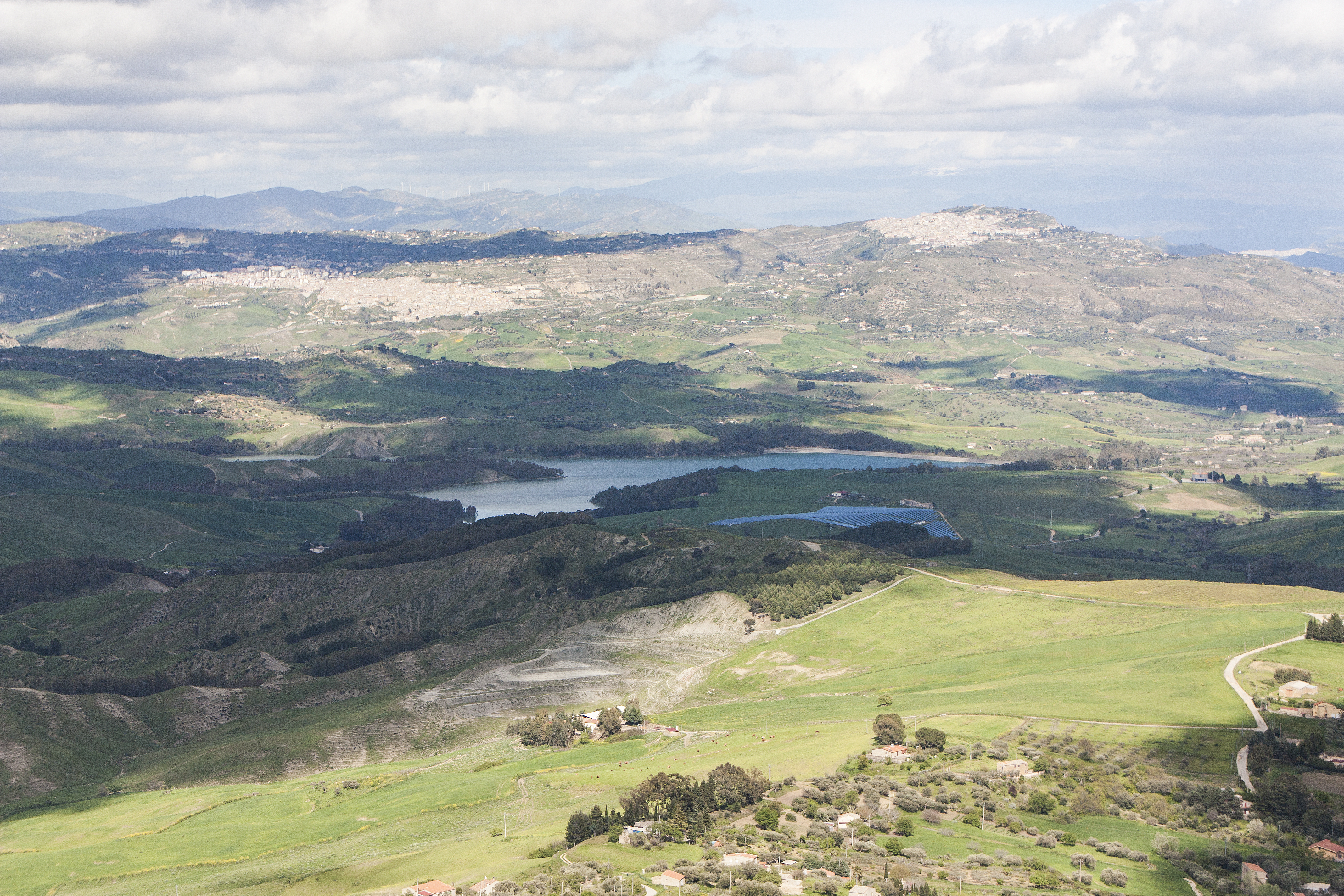 Lago Nicoletti, con Assoro e Leonforte visto da Calascibetta